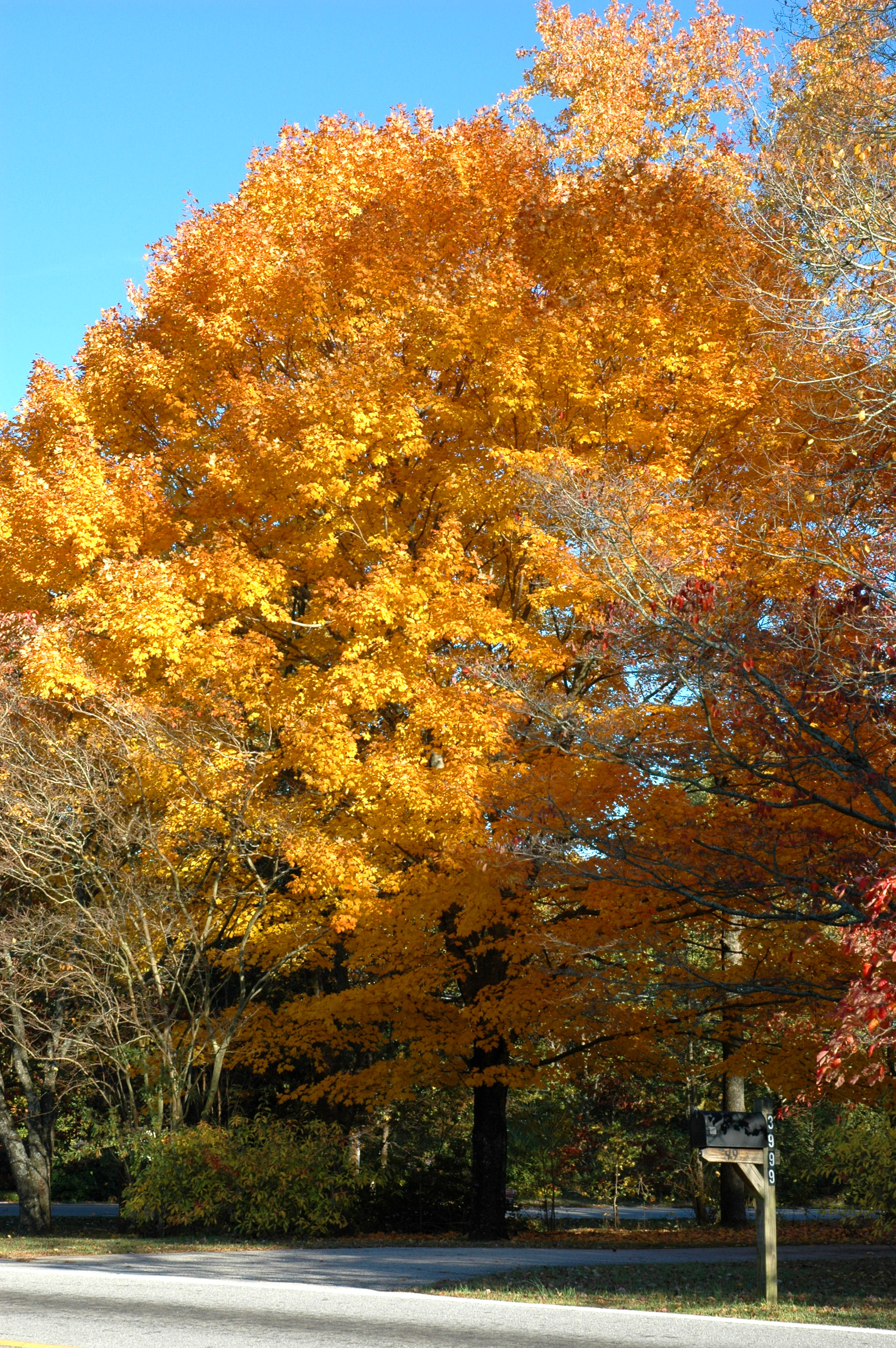 Golden sugar maple tree